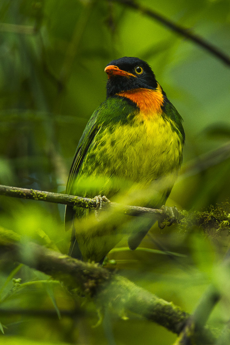 Orange-breasted Fruiteater (Pipreola jucunda99) - Mindo - Ecuador_S4E5422